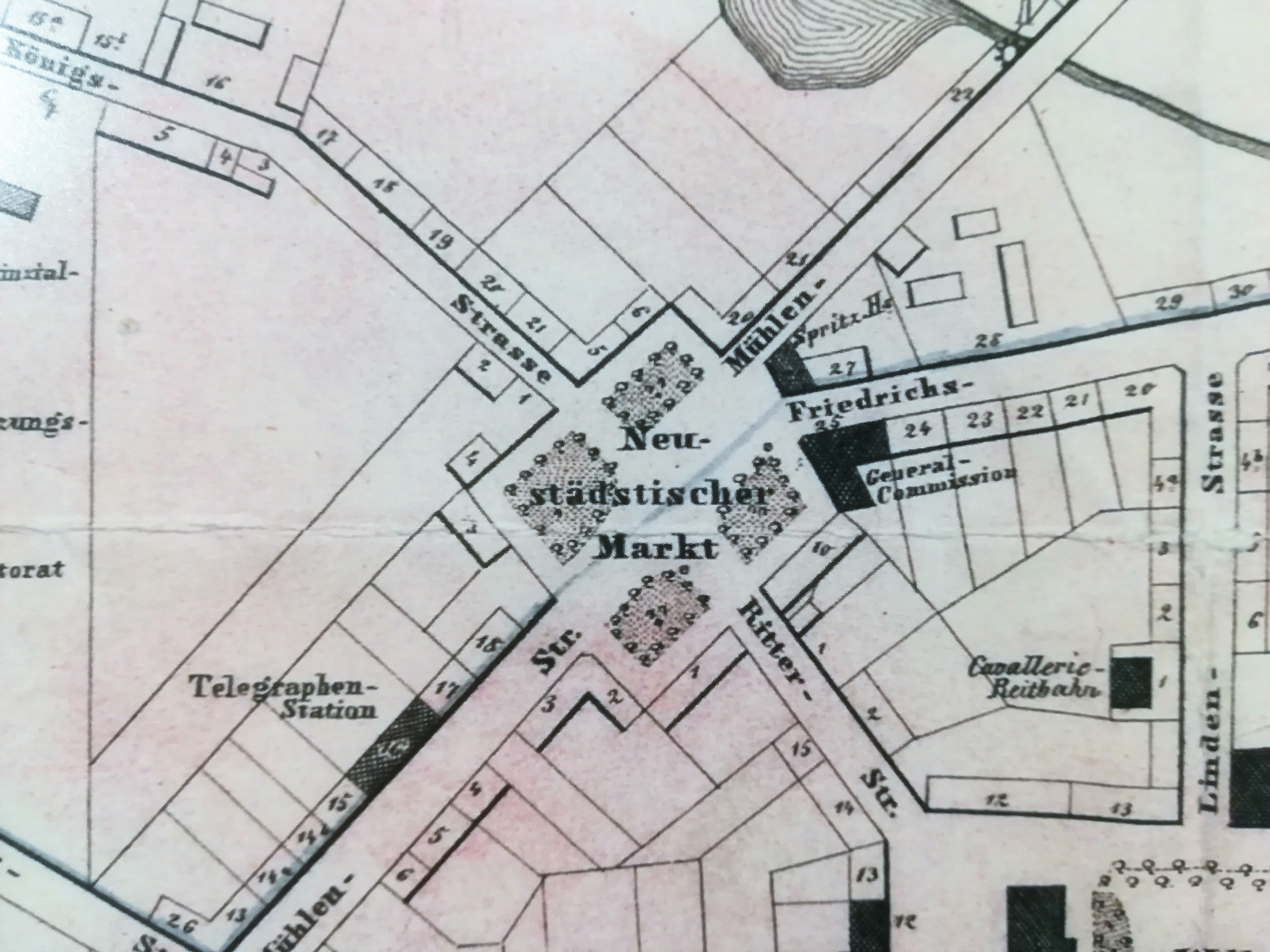 Plac Cyryla Ratajskiego w Poznaniu w 1856r.